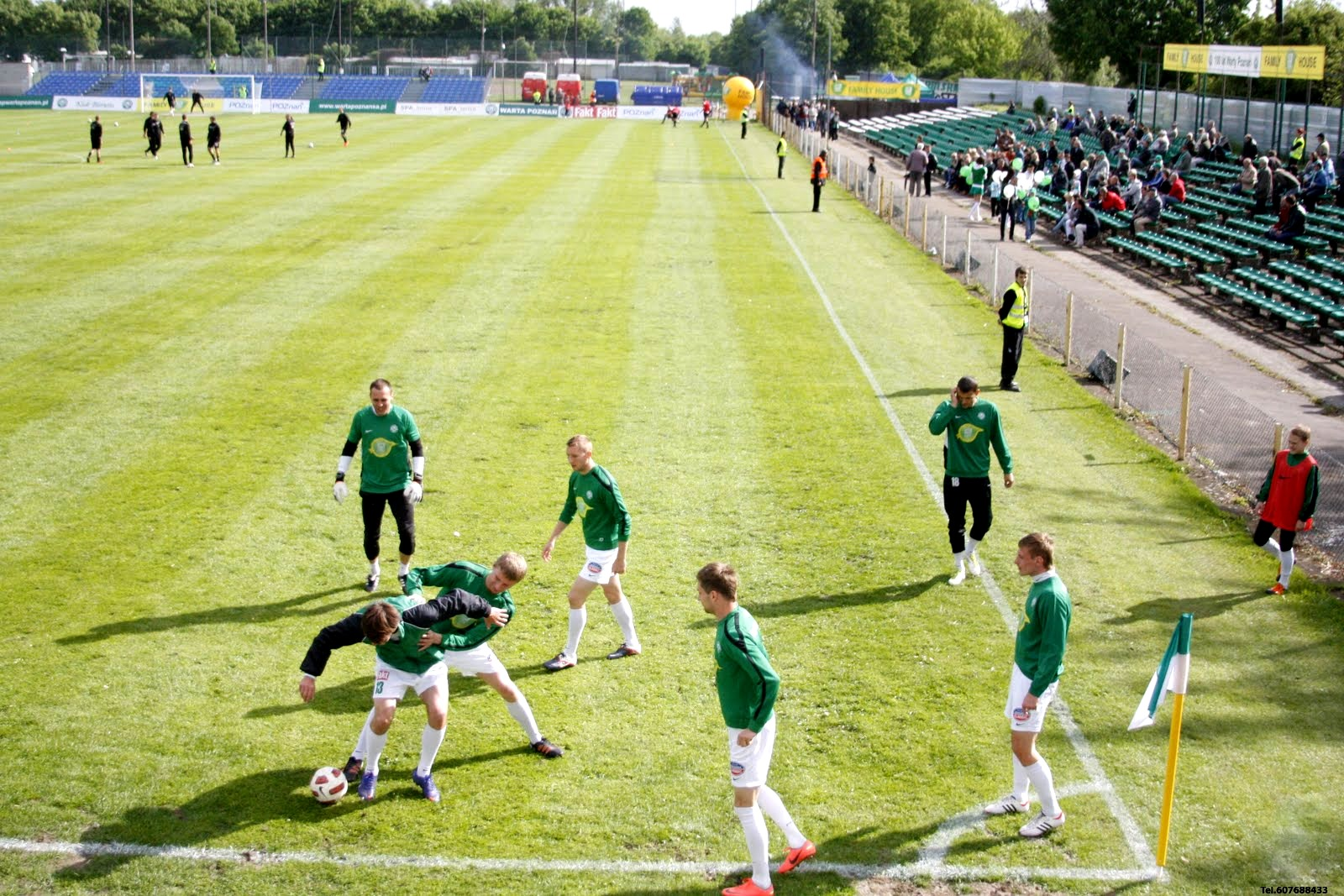 Stadion piłkarski w Poznaniu, przy Drodze Dębińskiej (Ogórdek) przed meczem Warty Poznań z GKS-em Bogdanka.